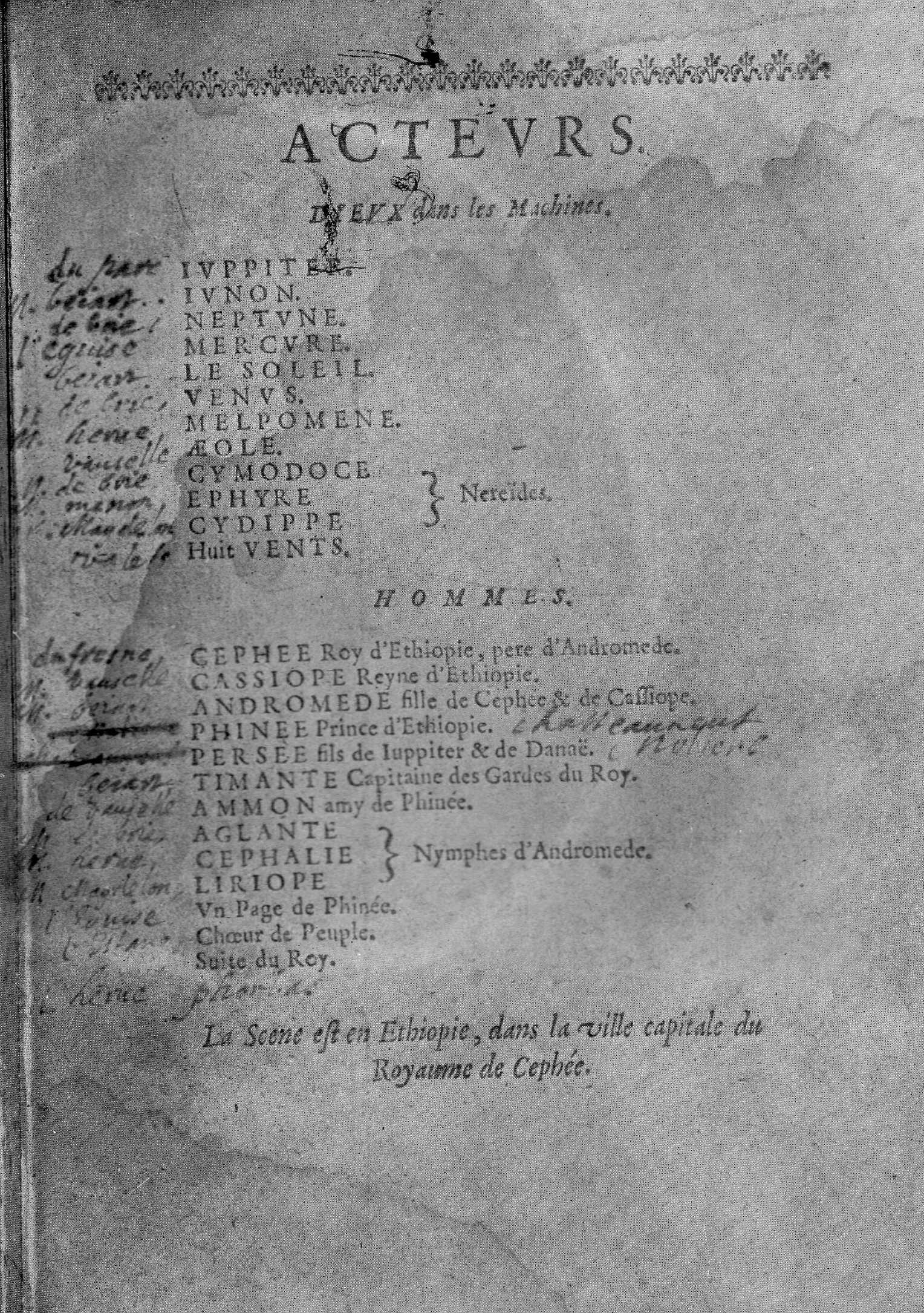 Liste des rôles de l'Andromède de Pierre Corneille, avec le nom des comédiens qui les ont tenus à Lyon en 1652-1653.